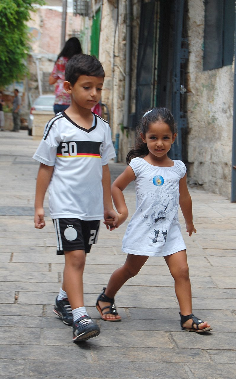 ילדים ערבים חמודים